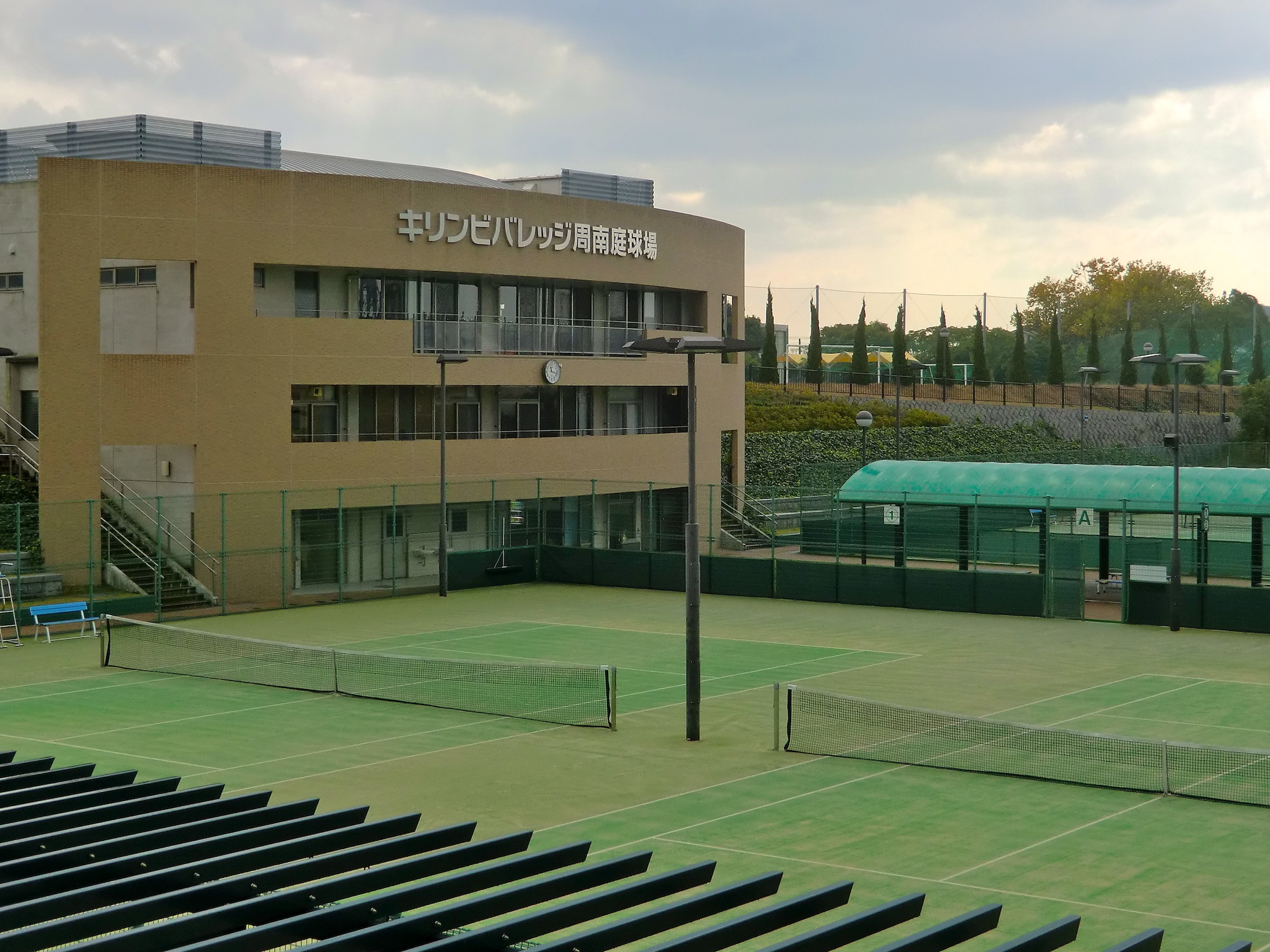 周南緑地公園の周南市庭球場全景（山口県周南市）